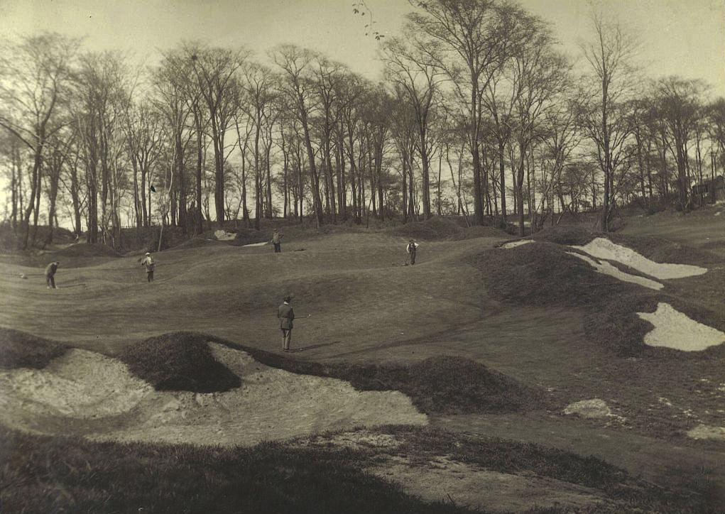 Alister MacKenzie Green at Sitwell Park, 140 Yards Par 3